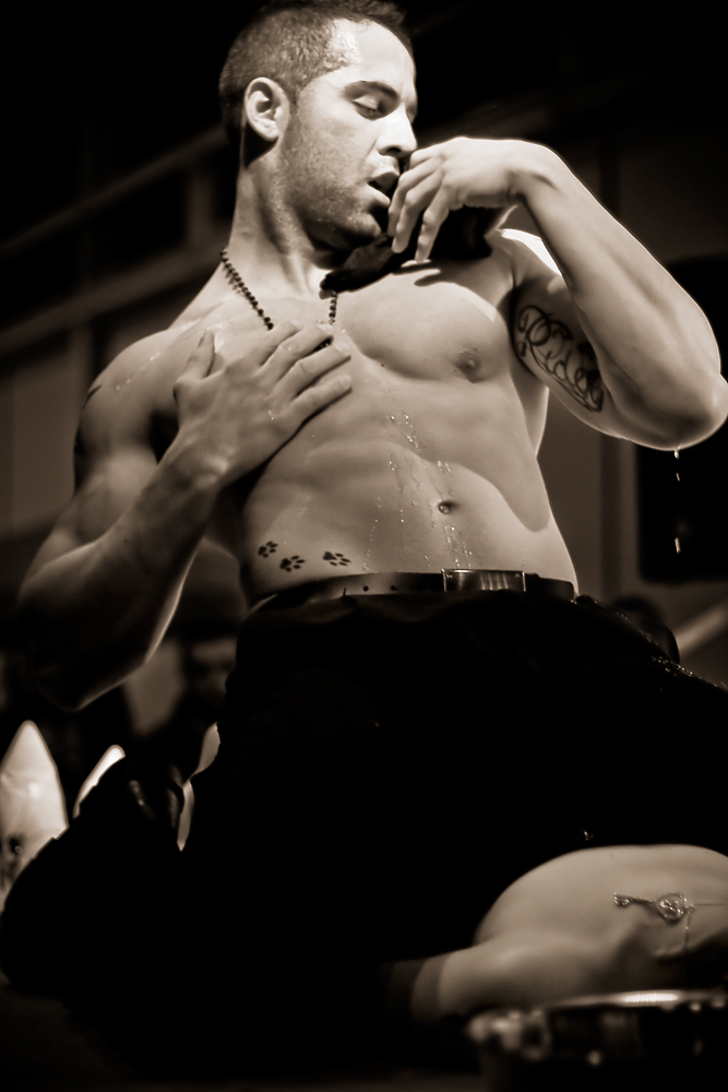 Dançarino atuando em festa.